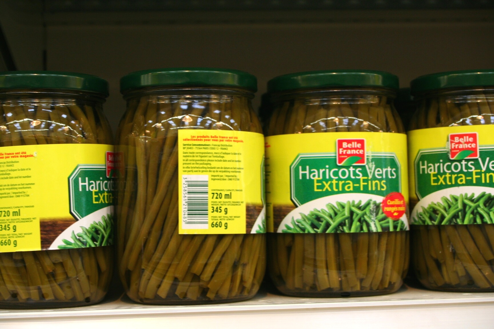 Haricots verts en conserve dans des bocaux de verre (Phaseolus vulgaris)